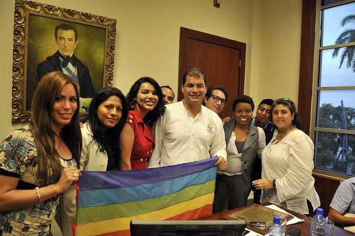 Reunión Histórica entre Representantes activistas LGBTI TILGB GLBTI Silueta X Diane Rodriguez Wilmer Brito Isaias Alvarez con el Presidente de Ecuador Rafael Correa Meeting Commitments President Correa and LGBTI